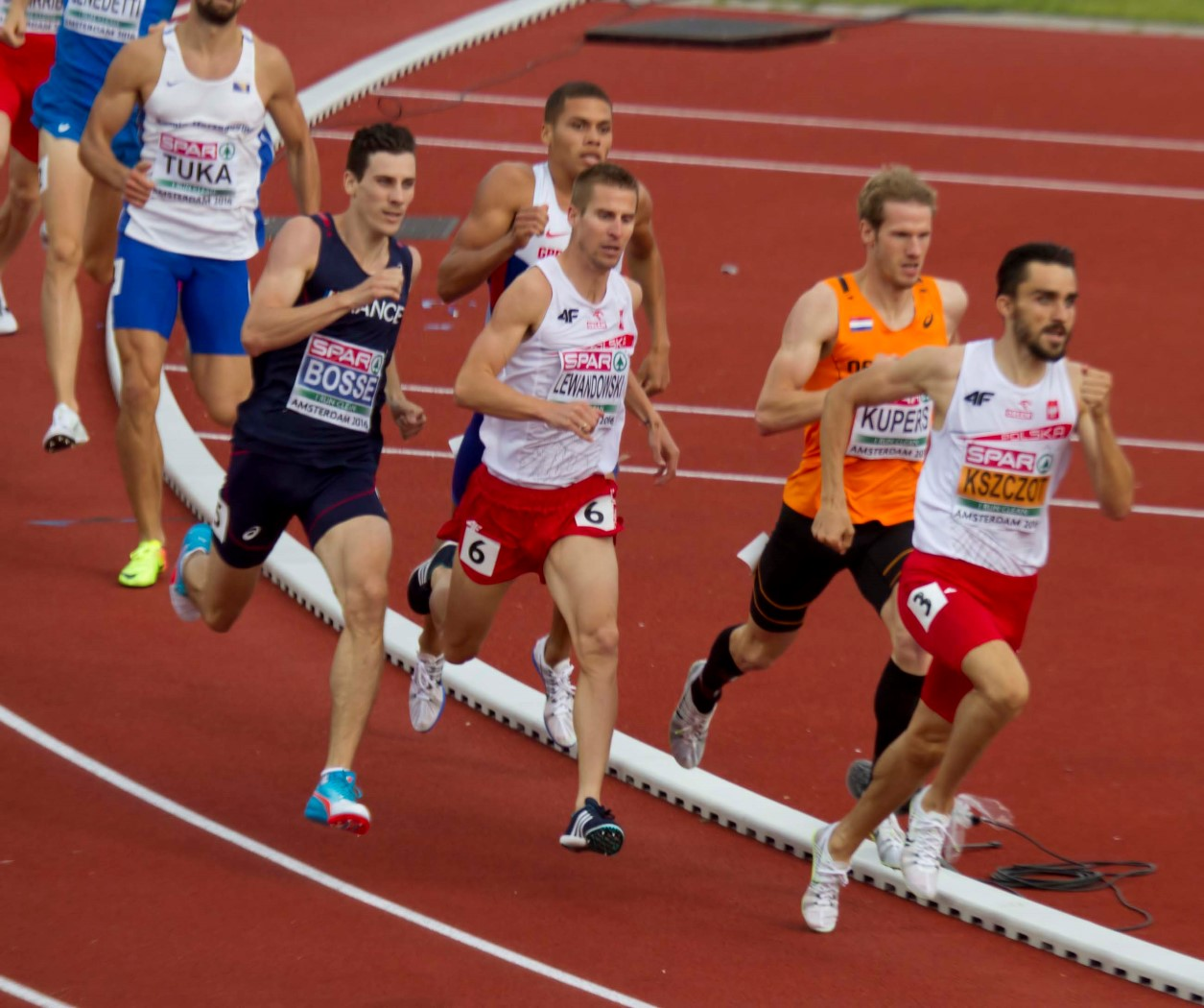 803 finale 800m heren